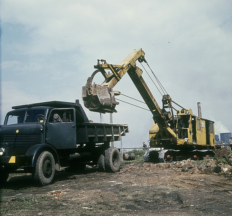 Original image description from the Deutsche FotothekDresden. Ausheben einer Baugrube mit Tieflöffelbagger und Abfuhr der Massen mit Kipper H6